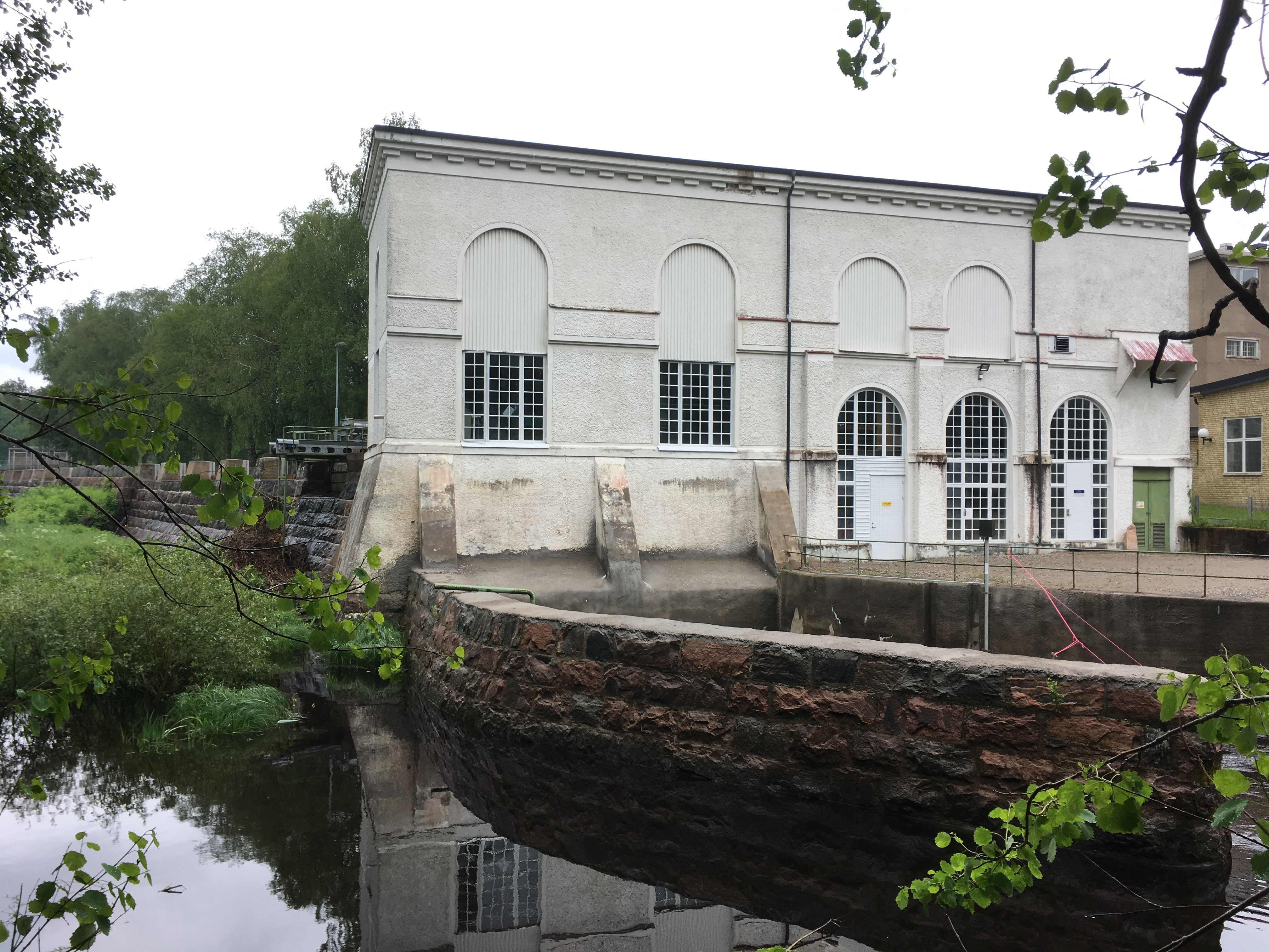 Rydals vattenkraftverk